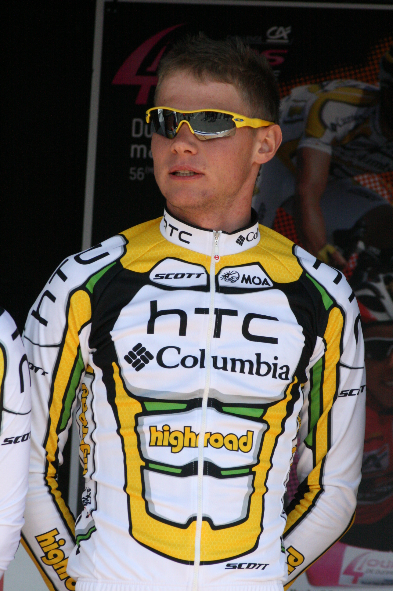 Jan Ghyselinck, lors de la présentation des équipes des 4 jours de Dunkerque 2010